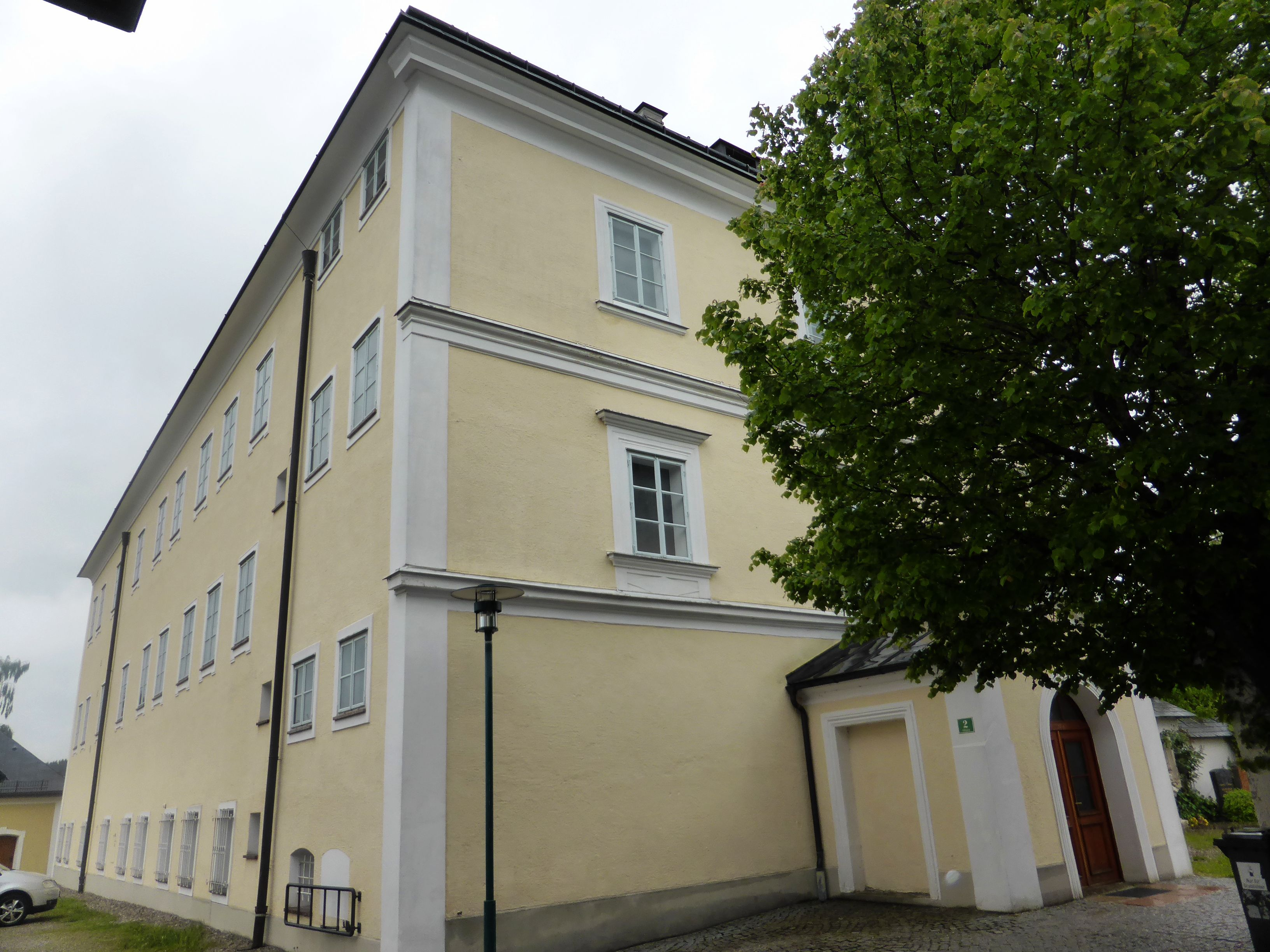 Gesamtanlage Kollegiatstift Seekirchen mit Nebengebäuden